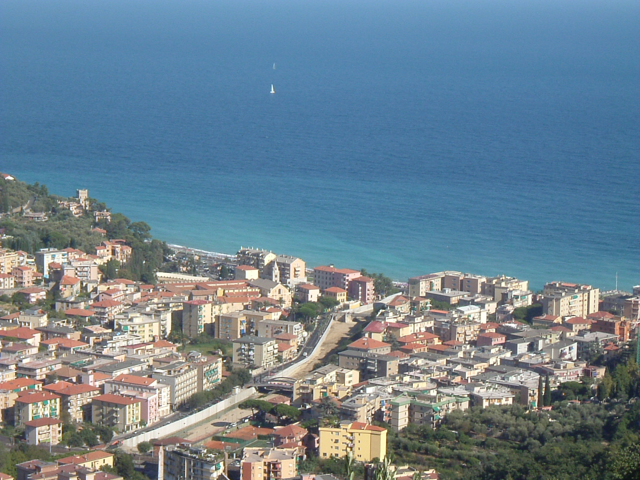 Finale Ligure - Final Pia vista dalla collina di San Bernardino